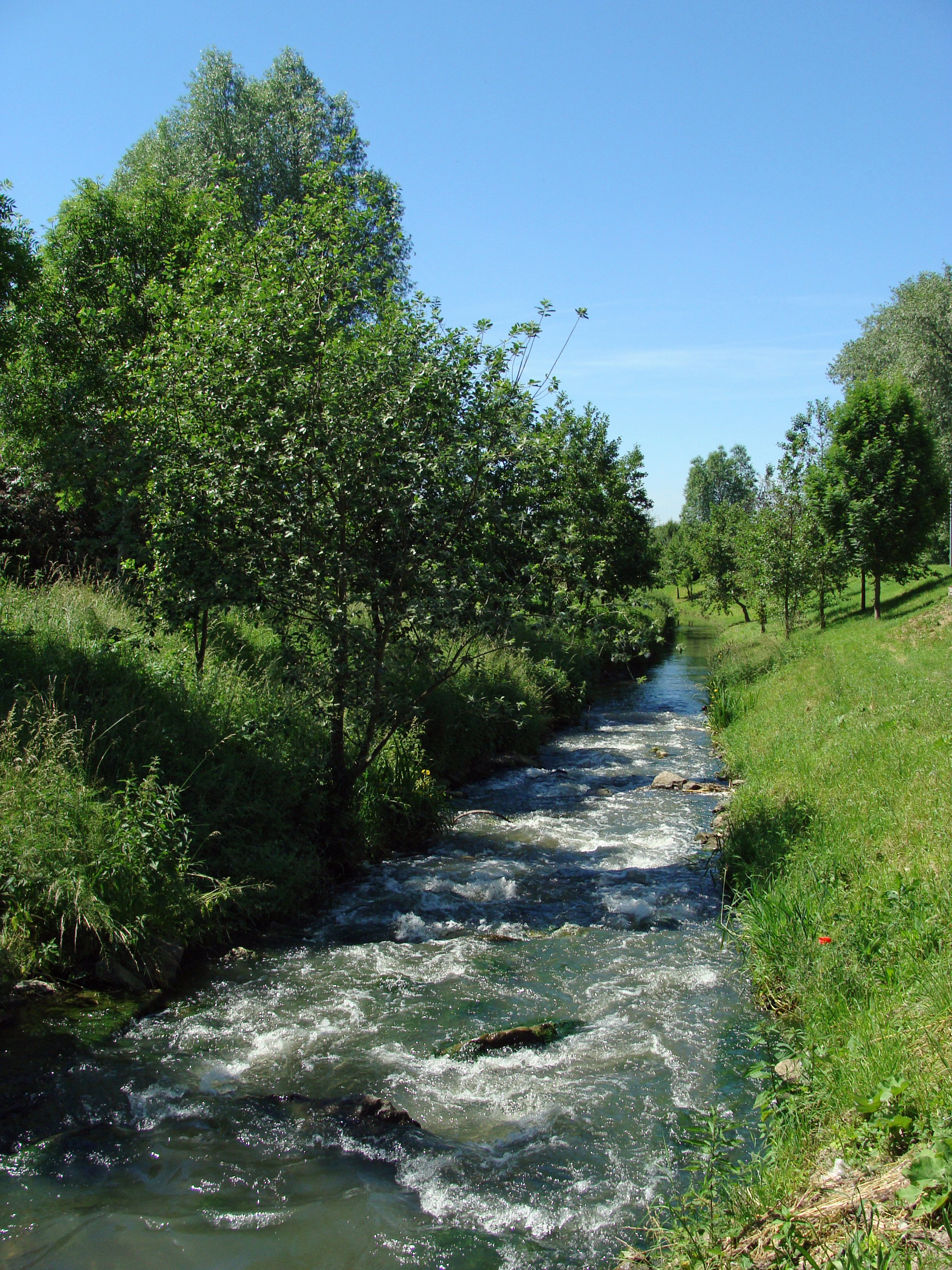 Deutschland: Leimbach in der Gemeinde Brühl